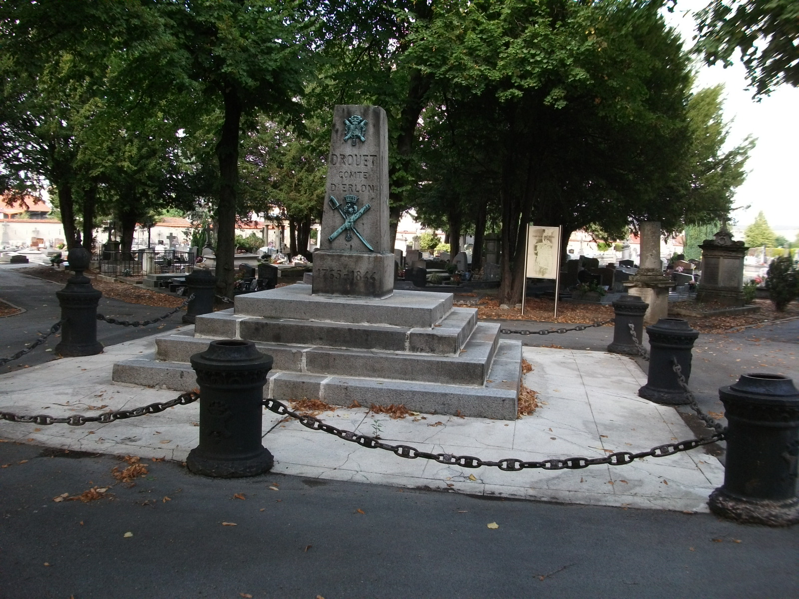 Monument de Jean Baptiste Drouet d'Erlon dans le cimetière du Nord de Reims où il est enterré.